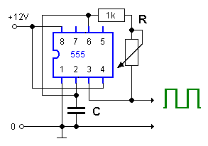 Kipposzillator für tiefe Frequenzen